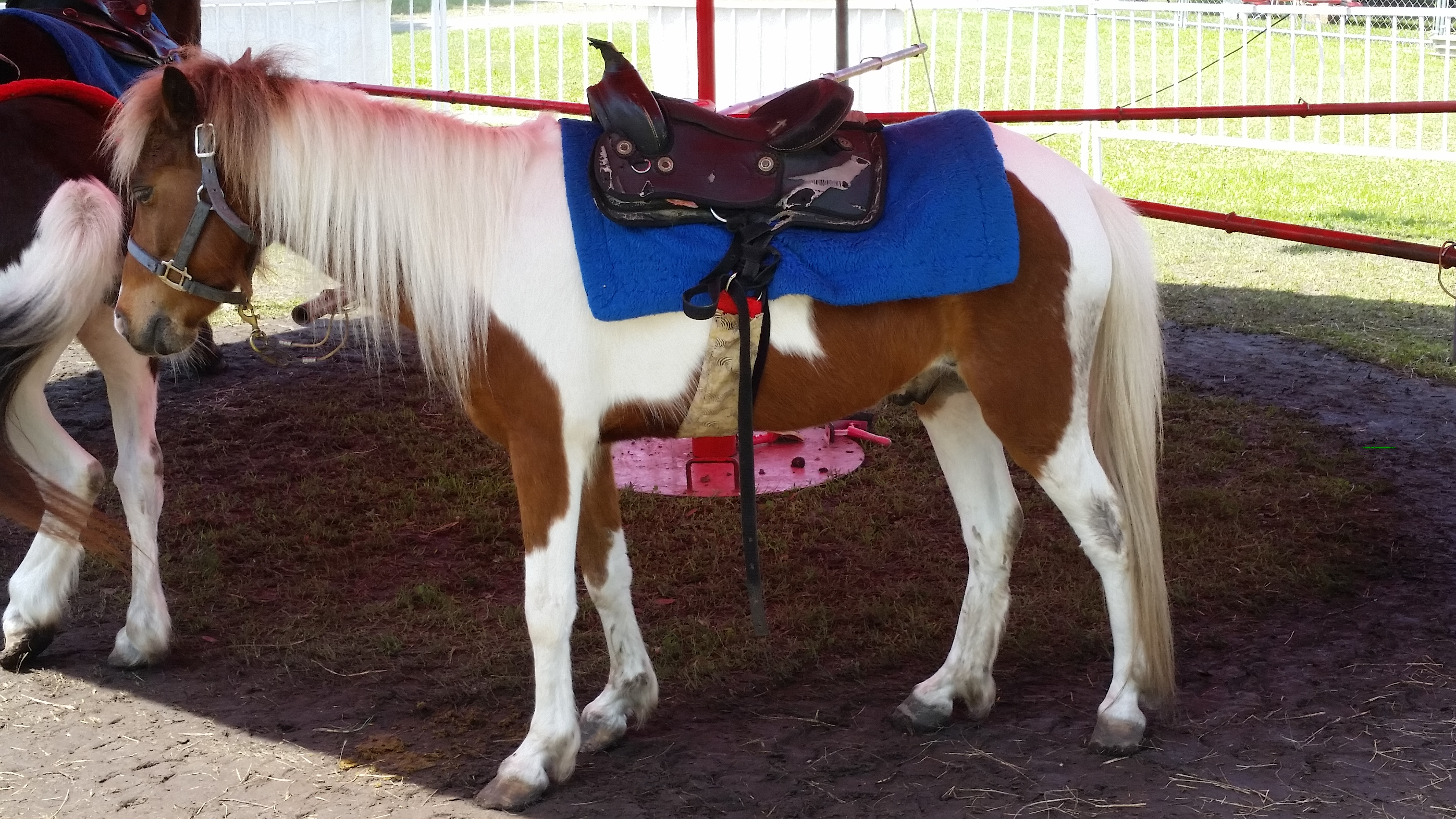 Pony ride at a carnival